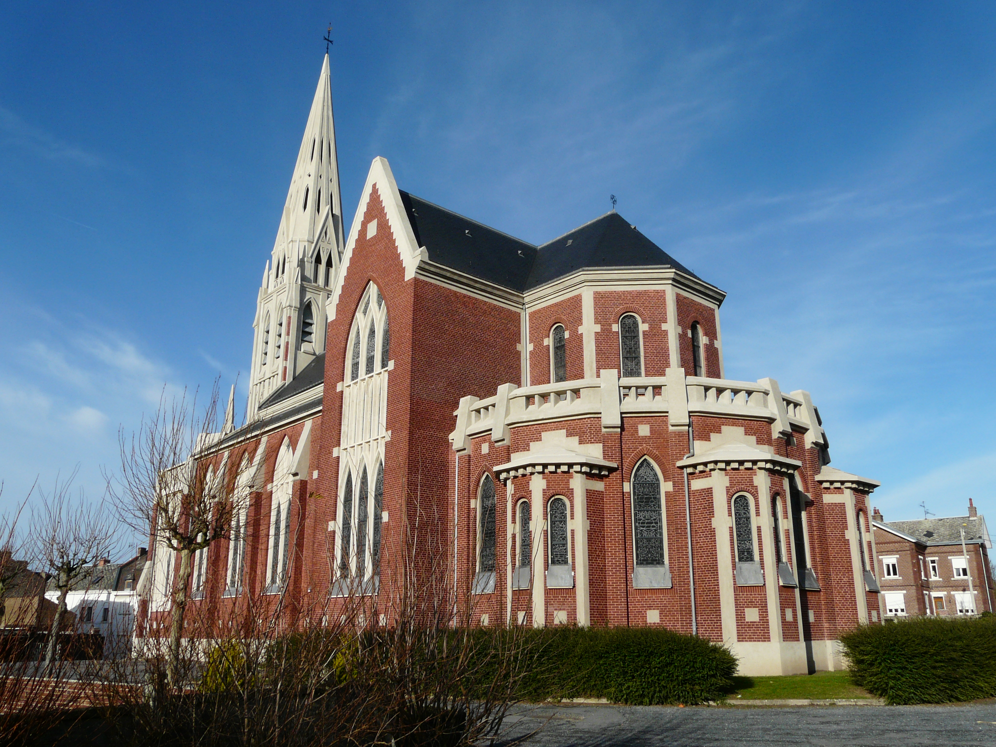 L'église Saint-Martin de Masnières (Nord) : le chevet